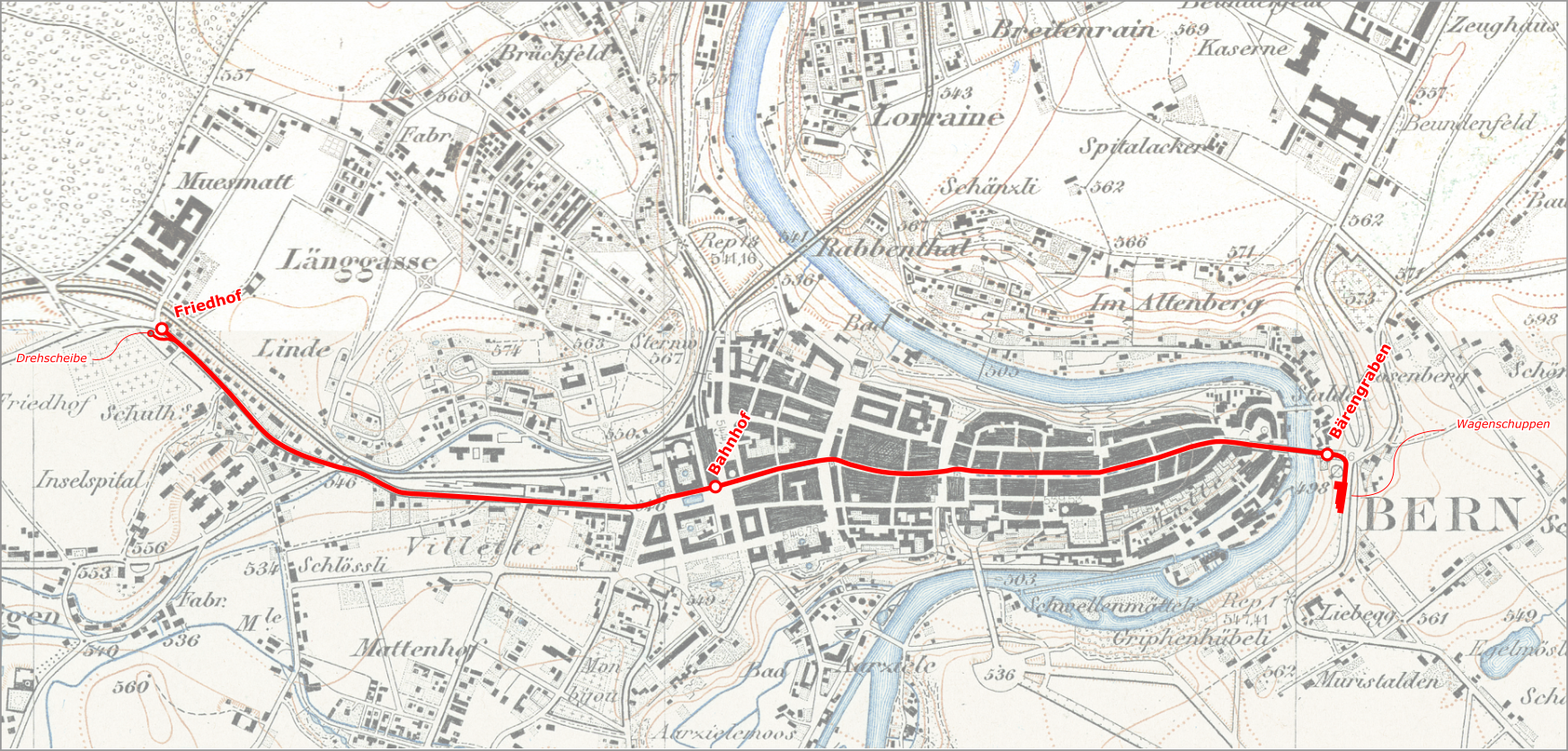 Strecke der Druckluftstrassenbahn in Bern im Jahre 1890